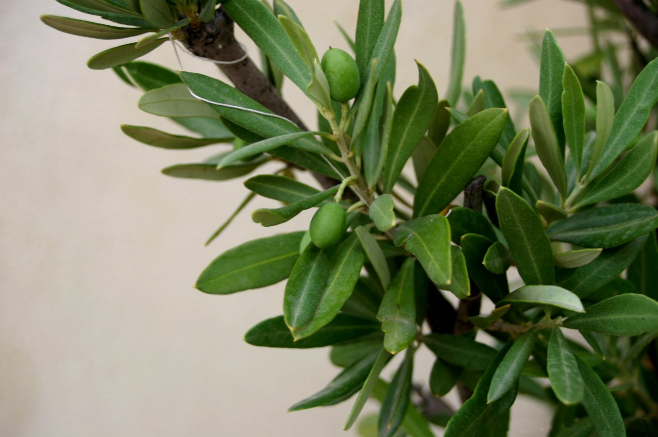 Olea europaea: Foliage and fruit